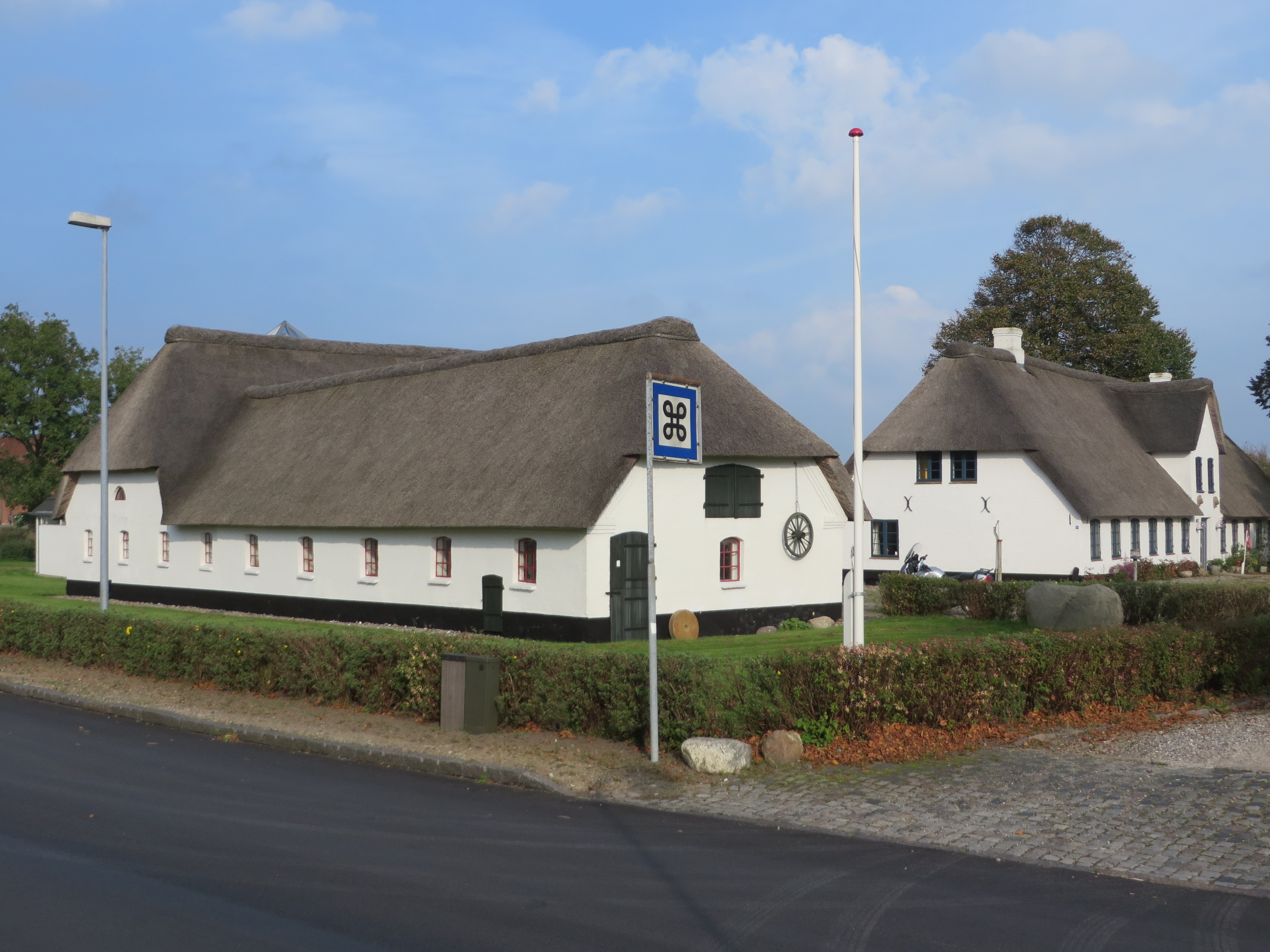 Der Hof Oldemorstoft von der Straße, Bild 004